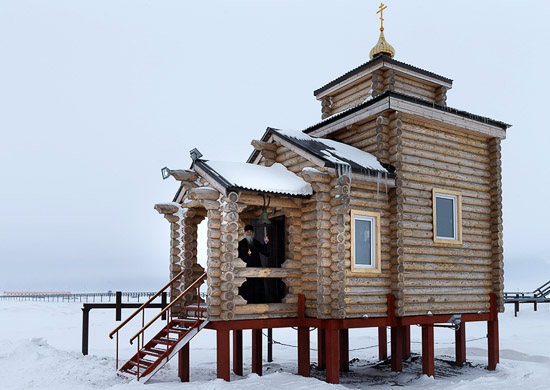 Часовня возле административно-жилого комплекса «Арктический трилистник», возводимого на острове Земля Александры архипелага Земля Франца-Иосифа.